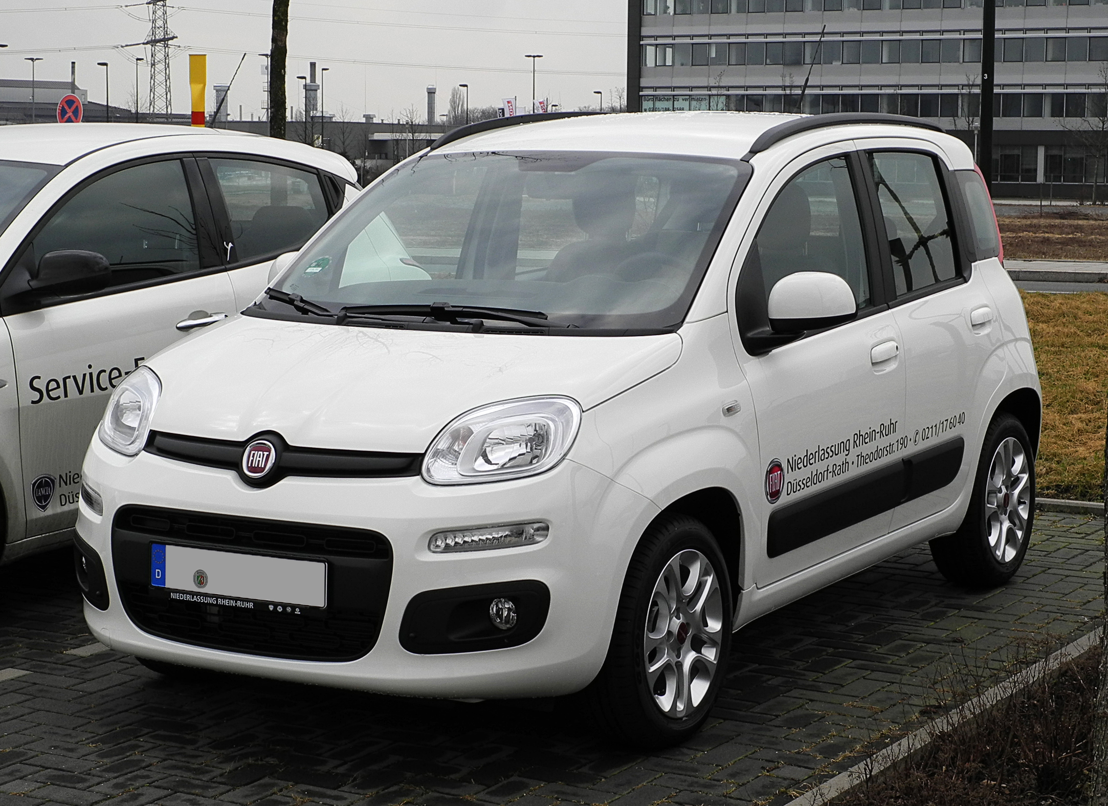 Fiat Panda 1.2 8V Lounge (III)